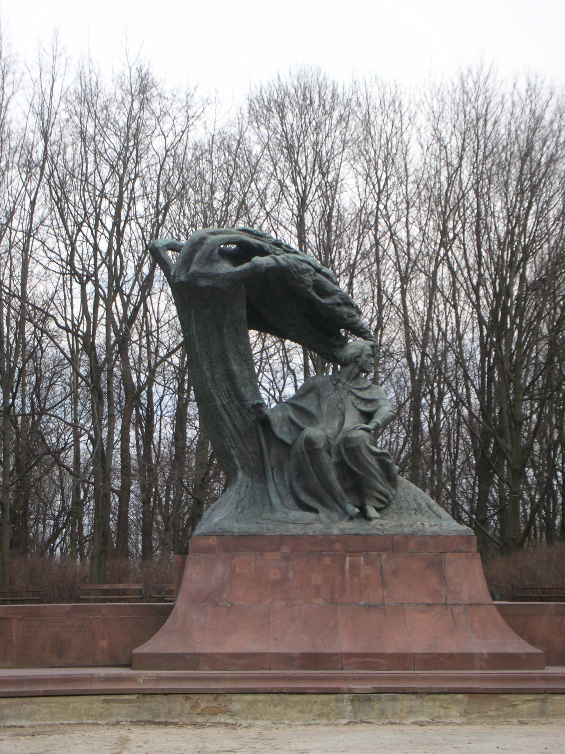 Monument a Chopin al Parc Lazienki a Varsòvia